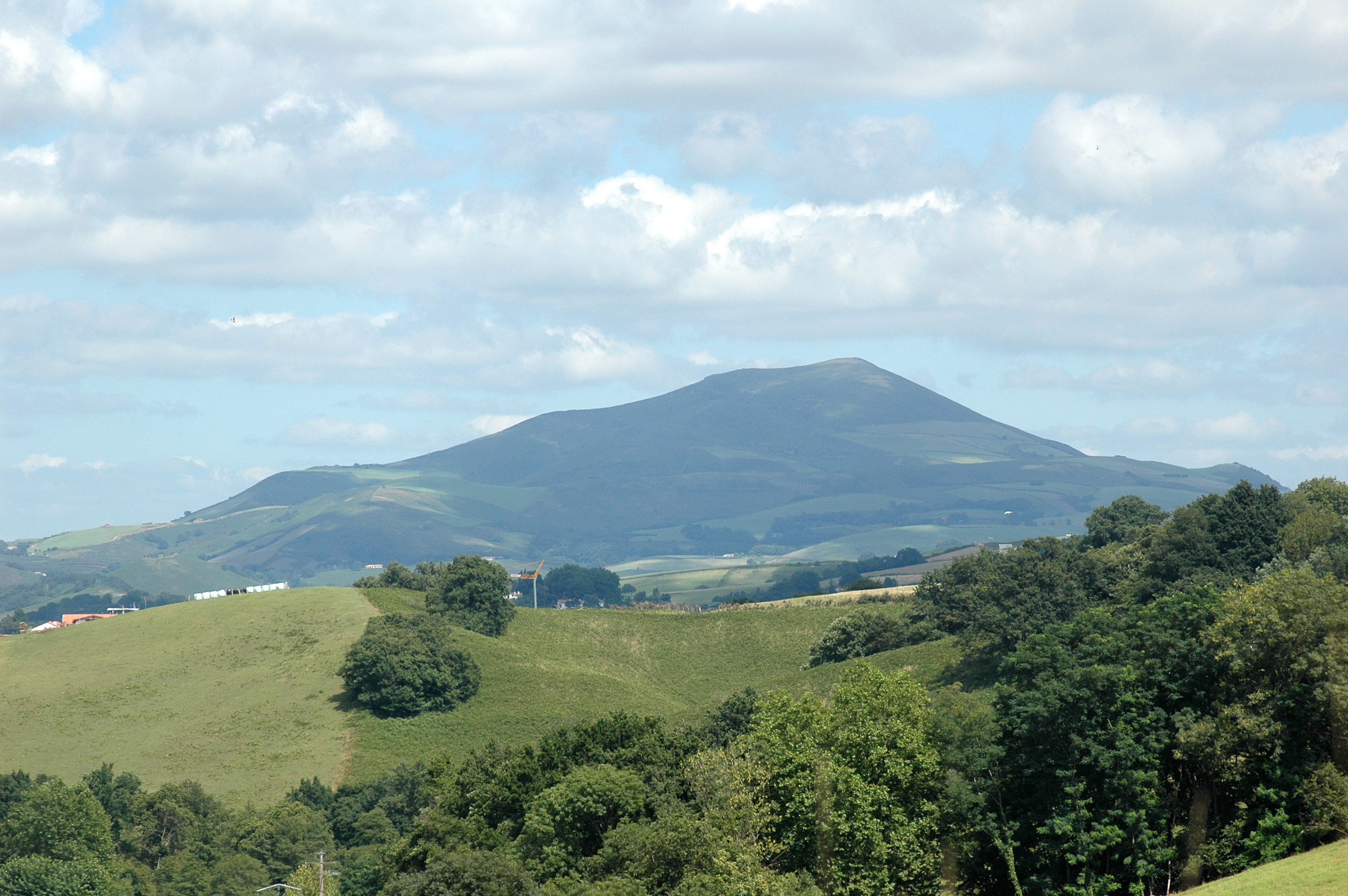 Souraïde, vue de l'Ursuya. Photo prise le 03/08/06 par Harrieta171